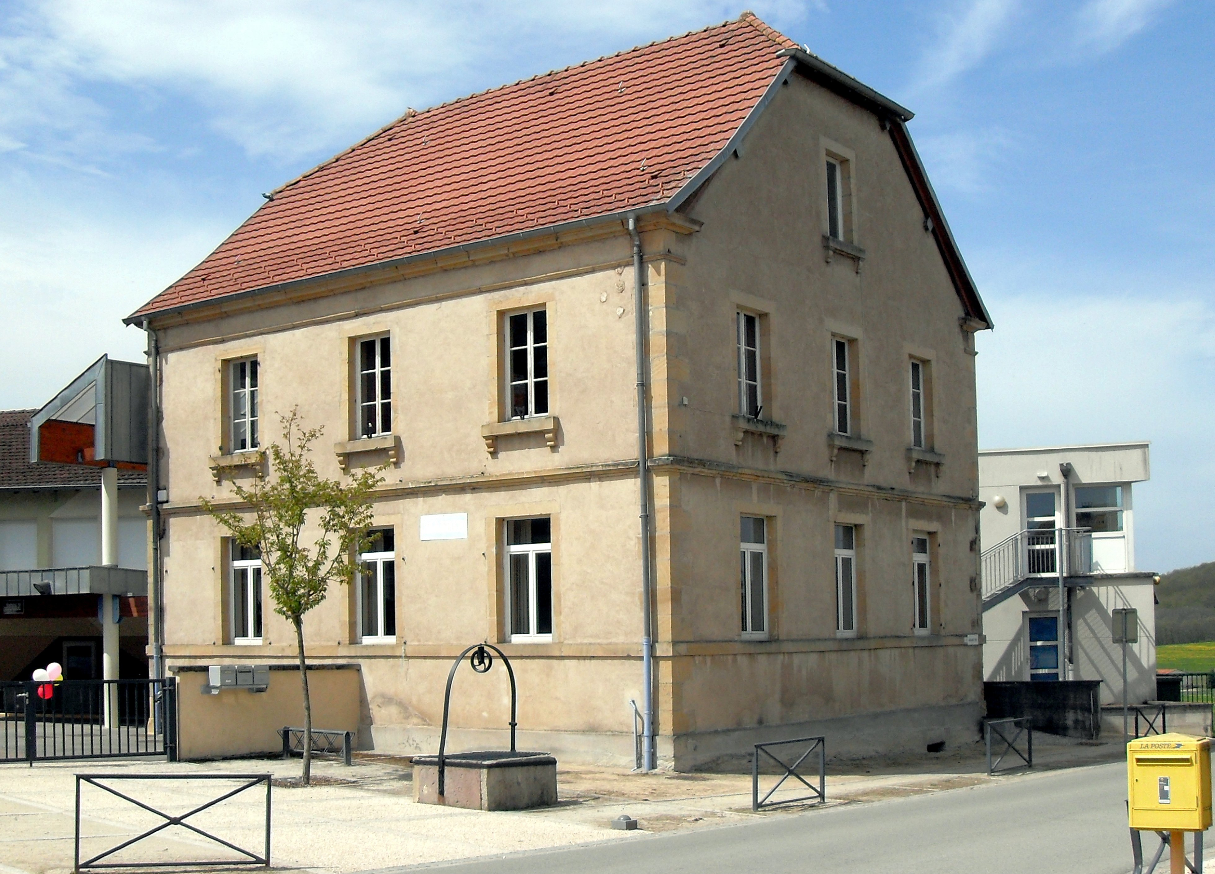 La mairie d'Échenans-sous-Mont-Vaudois